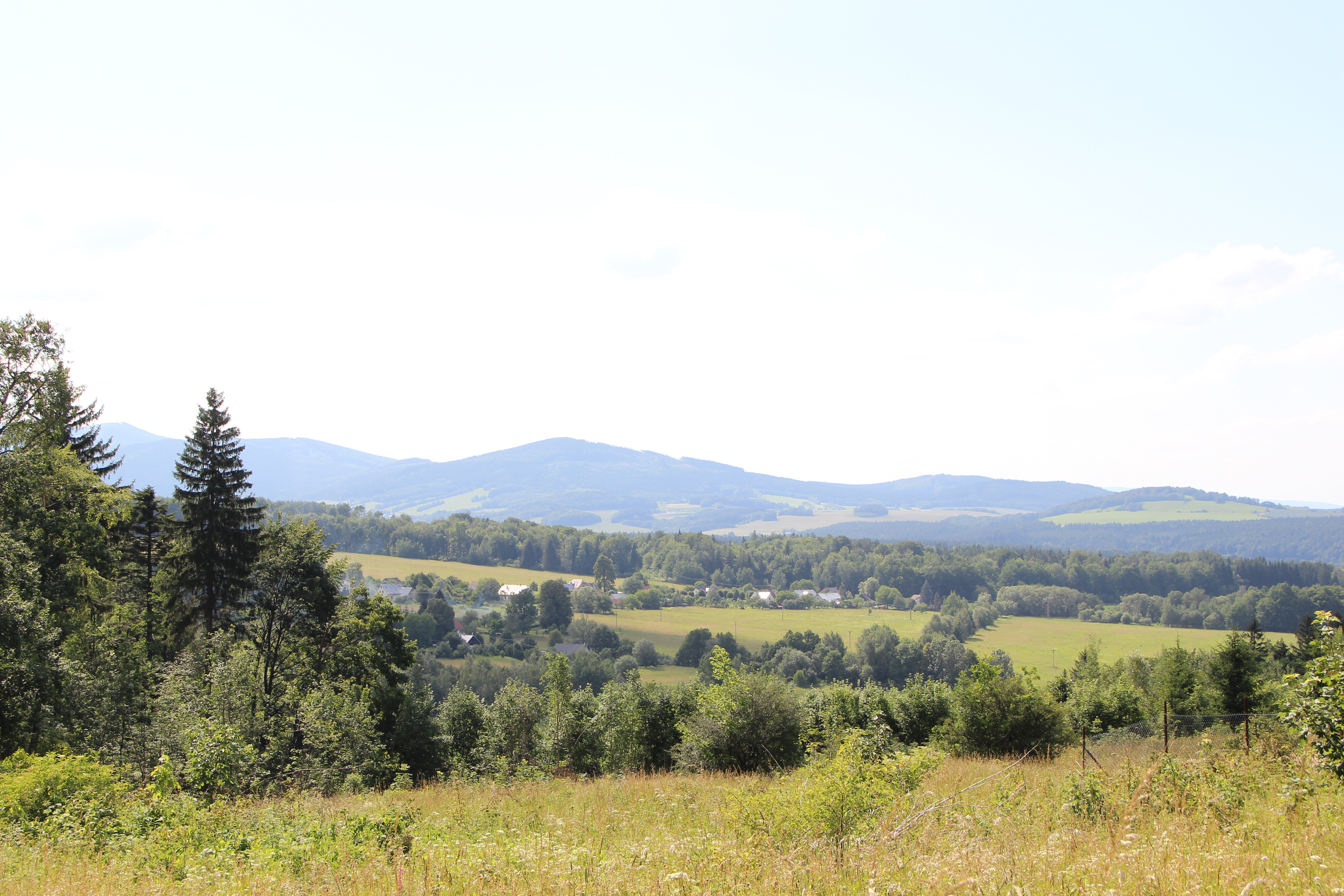 Podlesie - wieś w Polsce w województwie opolskim, w powiecie nyskim w gminie Głuchołazy.